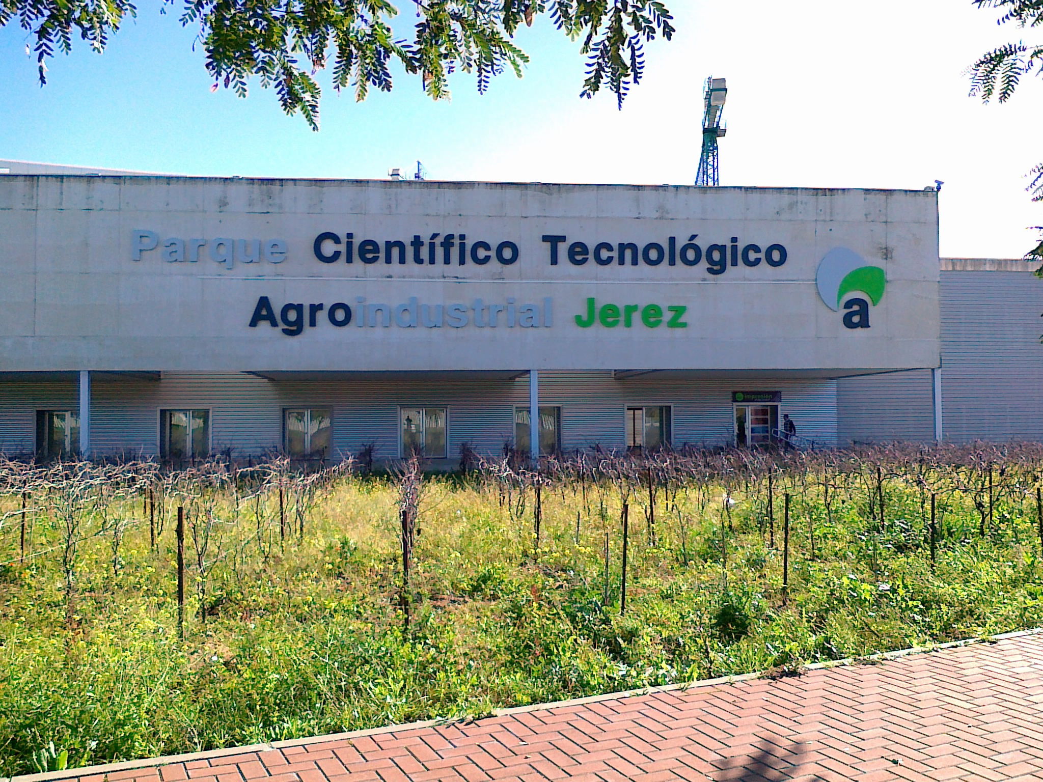 Frontal del Edificio Singular del Parque Tecnológico Agroindustrial de Jerez de la Frontera (Andalucía, España)